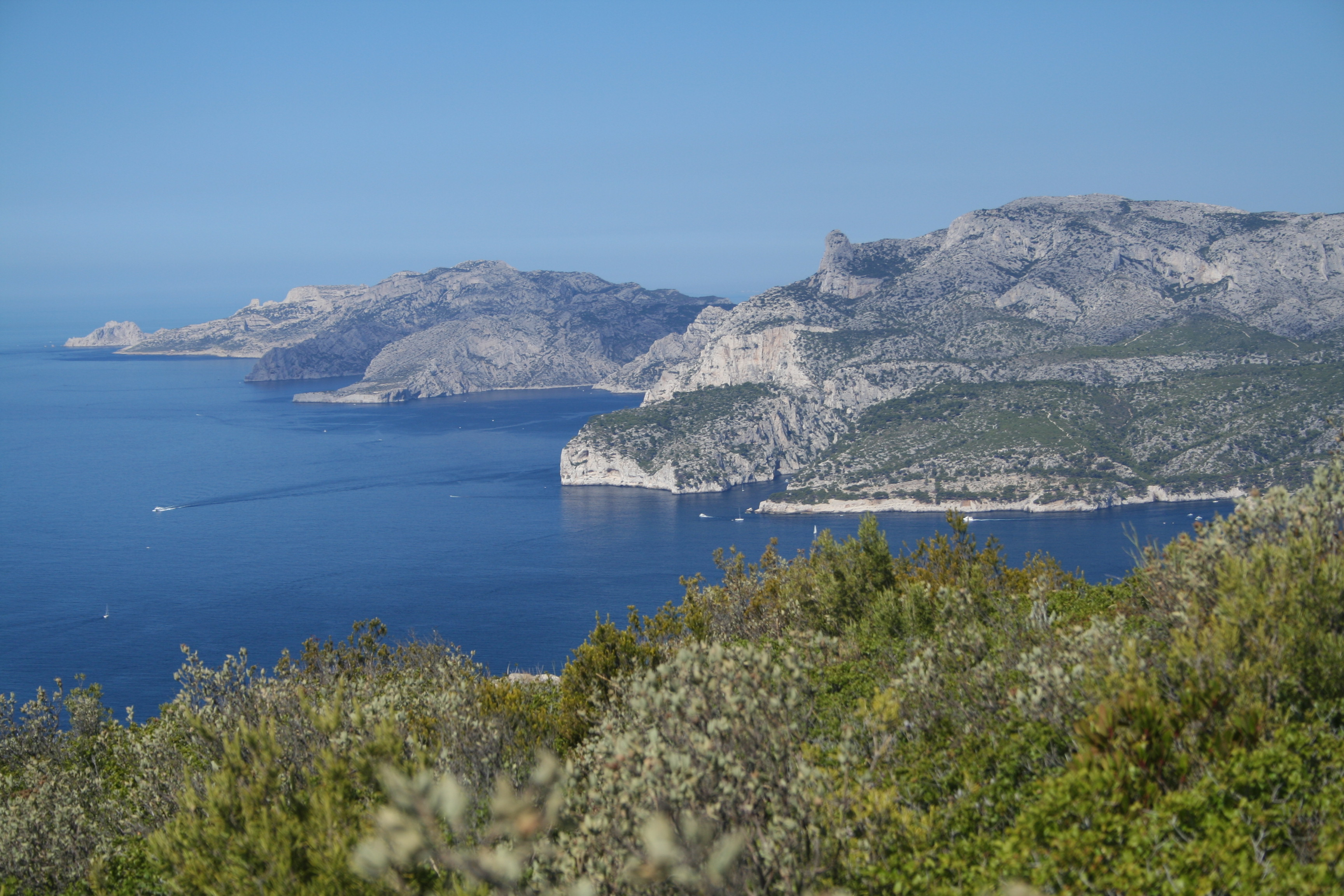 Vue des calanques de Cassis depuis la route des Crêtes reliant La Ciotat à Cassis (Bouches-du-Rhône, France)